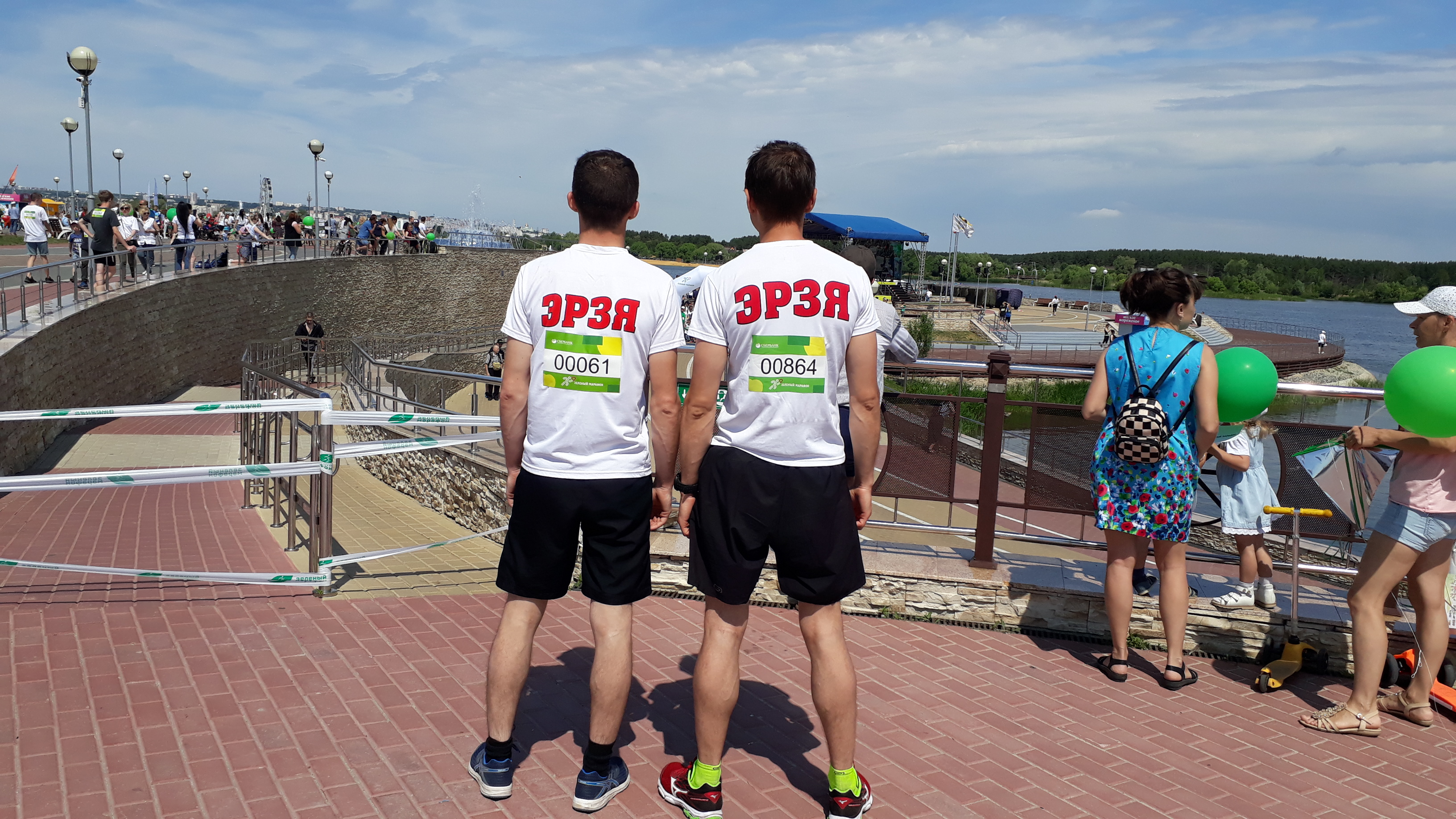 Участники забега "Зелёный марафон" от Местной мордовской (эрзяно-мокшанской) национально-культурной автономии города Пензы перед стартом. Забег на 4,2 км проводится компанией Сбербанк, состоялся 01.06.2019 в микрорайоне город-спутник села Засечное Пензенского района Пензенской области